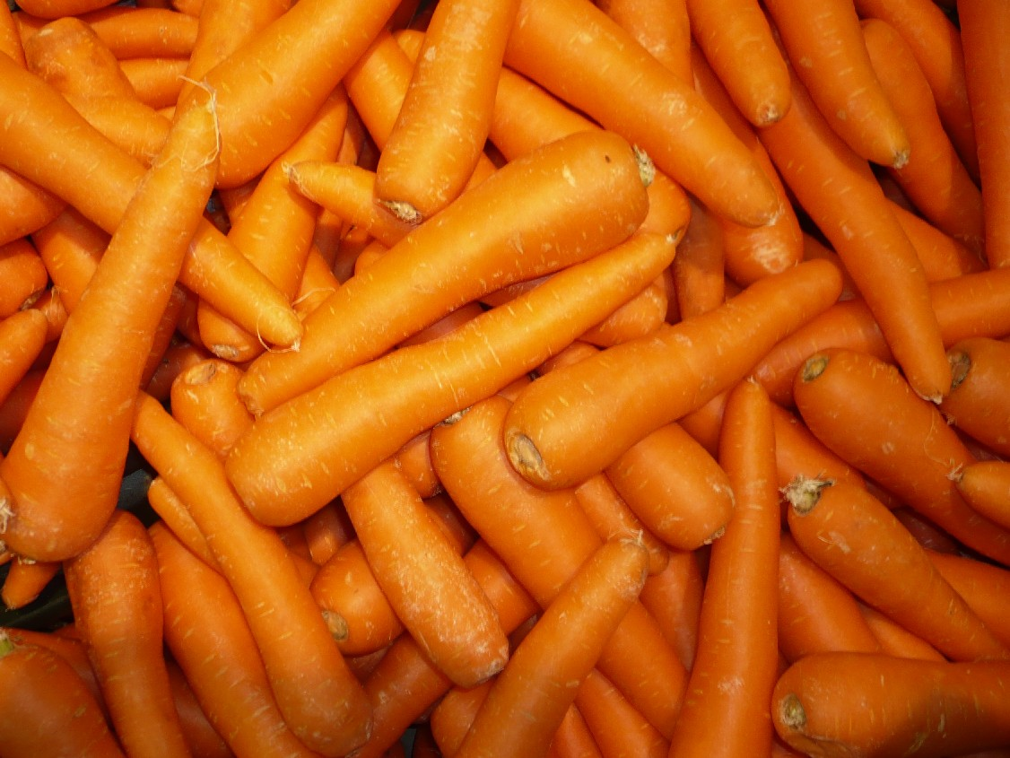 ഓസ്‌ട്രേലിയൻ കാരറ്റ് ജിദ്ദയിലെ സൂപ്പർ മാർക്കറ്റിൽ